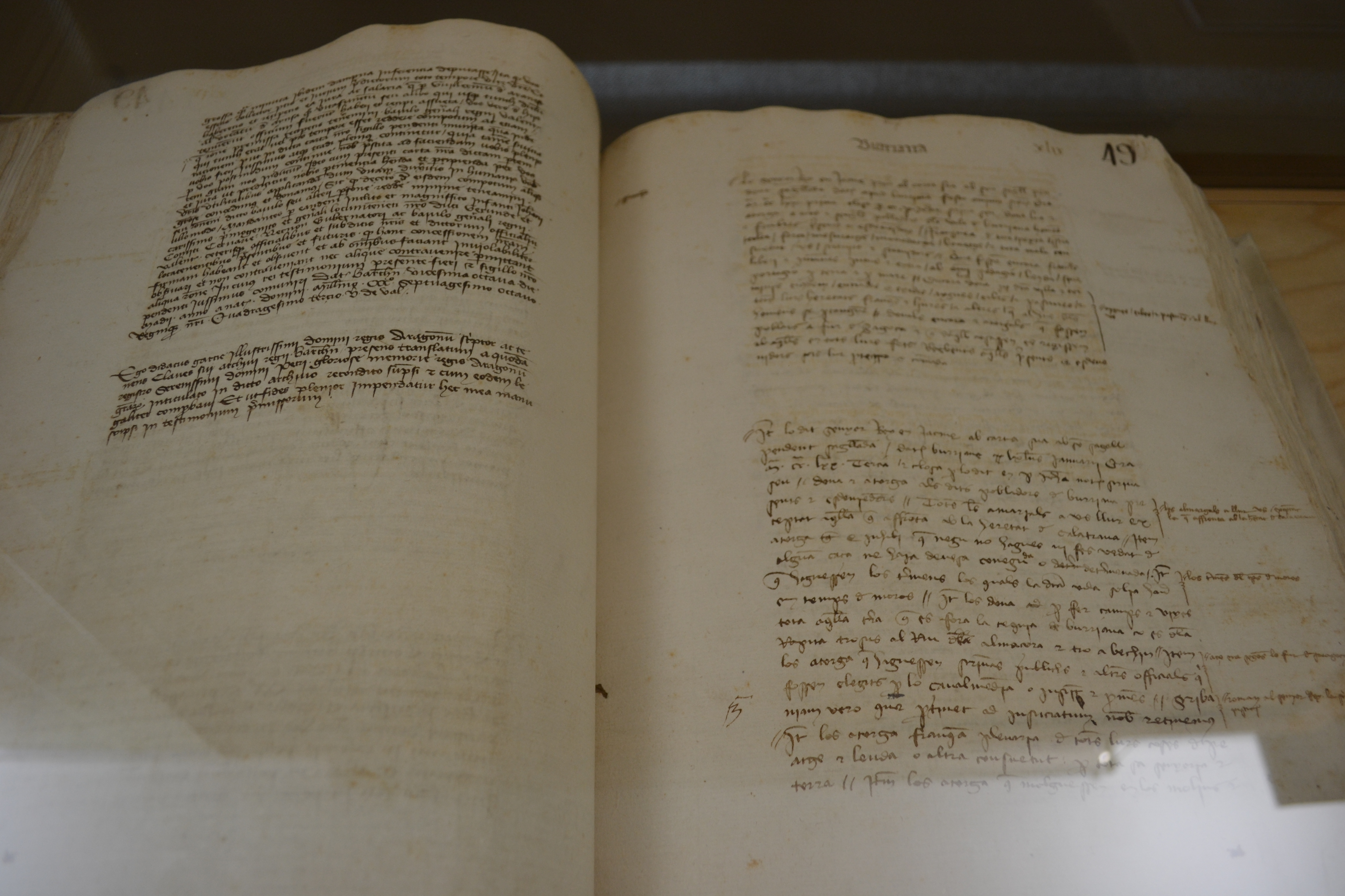 Resum de la carta de poblament que Jaume I concedí a la vila de Borriana, donant-li amples franqueses i el fur de Saragossa (1 de novembre de 1233). ARV: Reial Cancellería, registre 611, fol. 49r (còpia del segle XV). Arxiu del Regne de València